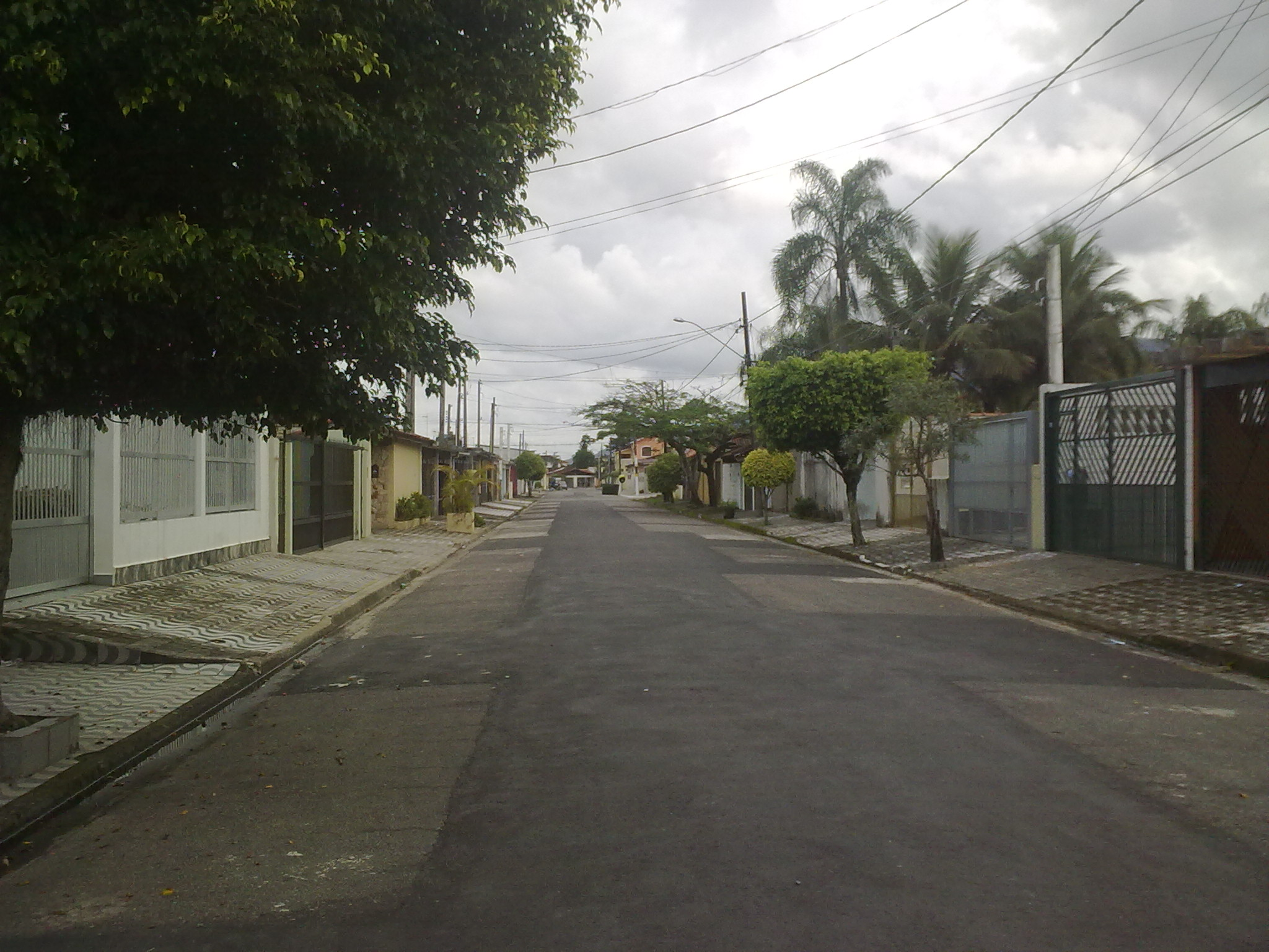 Uma das ruas do Jardim Real em Praia Grande